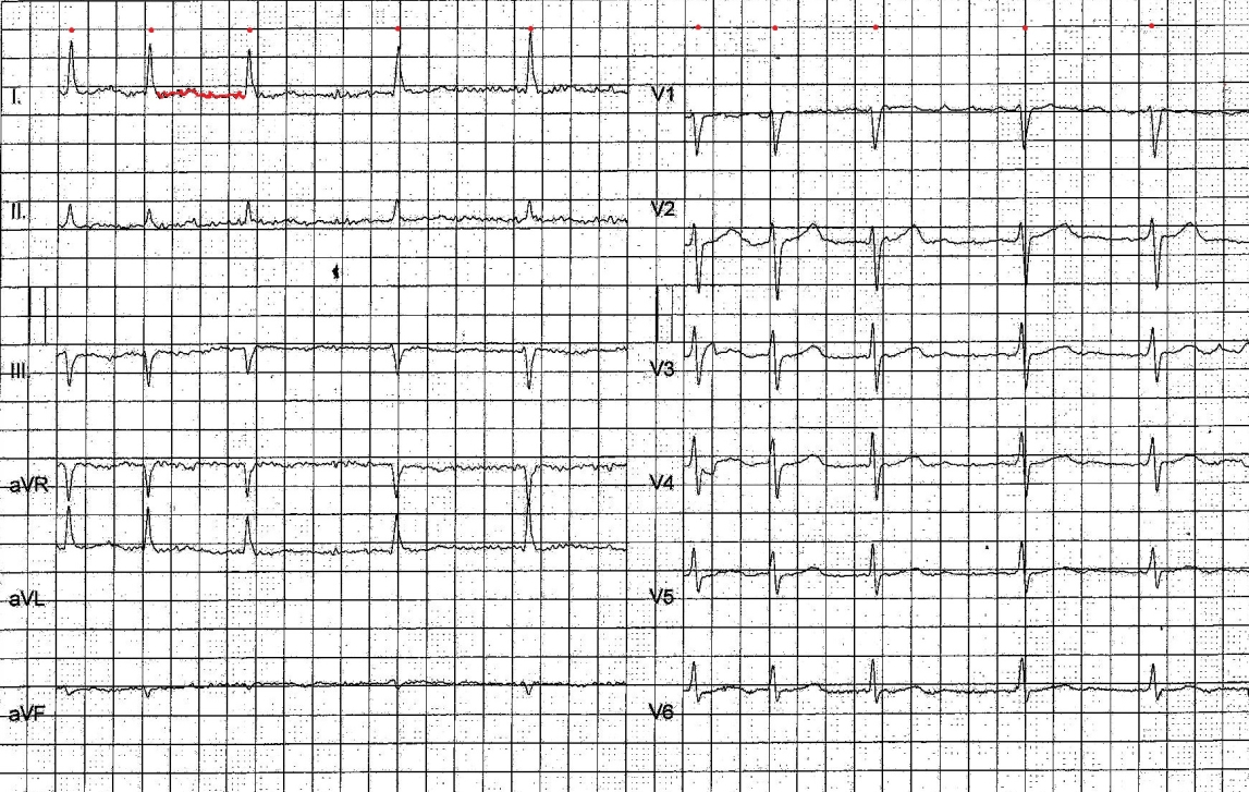 Elektrokardiogram pri najčastejšej poruche srdcového rytmu - fibrilácii predsiení. Charakteristická je nepravidelná činnosť komôr (vyznačená červenými bodkami), chýbanie vĺn P a chvenie základnej línie kriviek (vyznačené červenou líniou na časti záznamu)